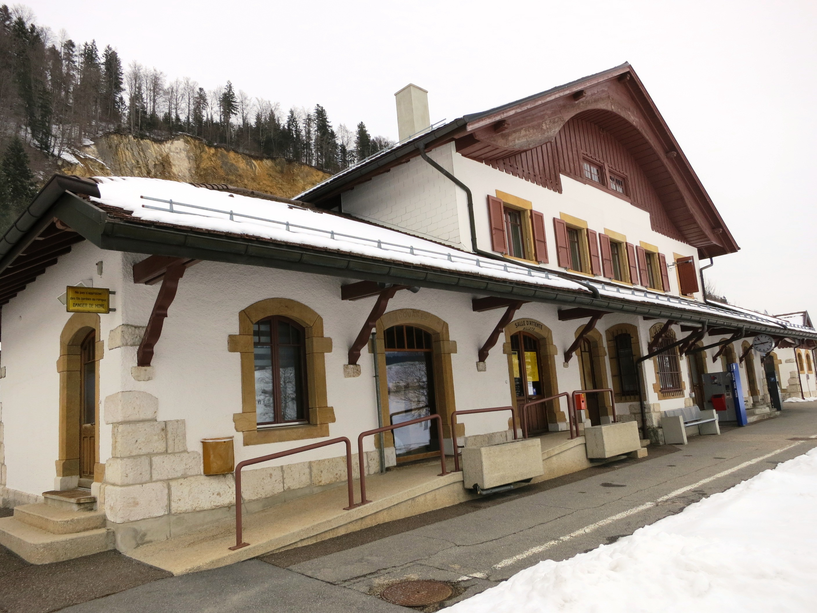 Bahnhof, Col-des-Roches, Le Locle, Schweiz